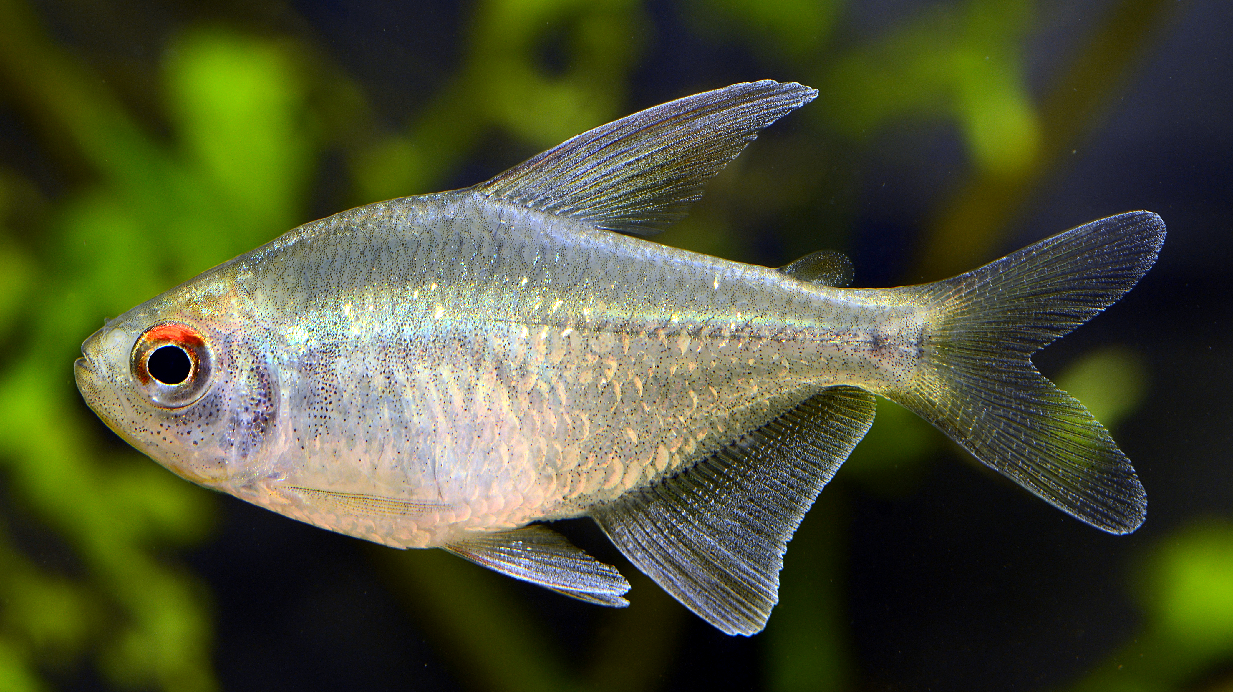 Briljanttetra, ung individ i akvarium